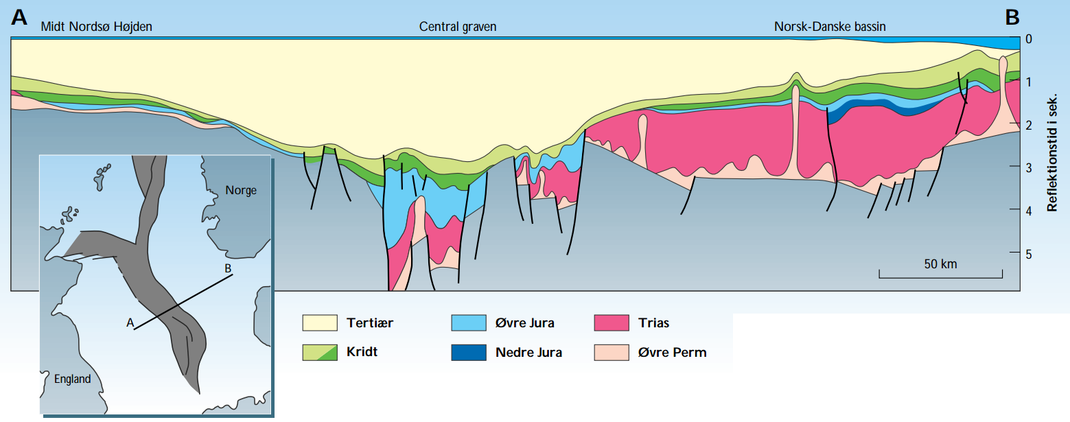 Længdesnit gennem den danske del af Central Graben